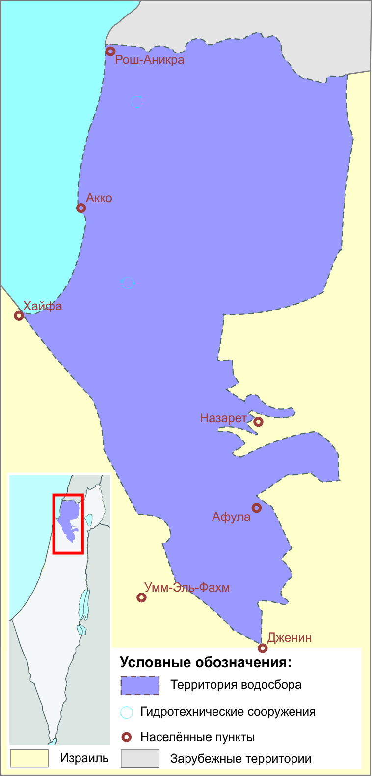 Карта водосборного бассейна Западной Галилеи / водные ресурсы государства Израиль